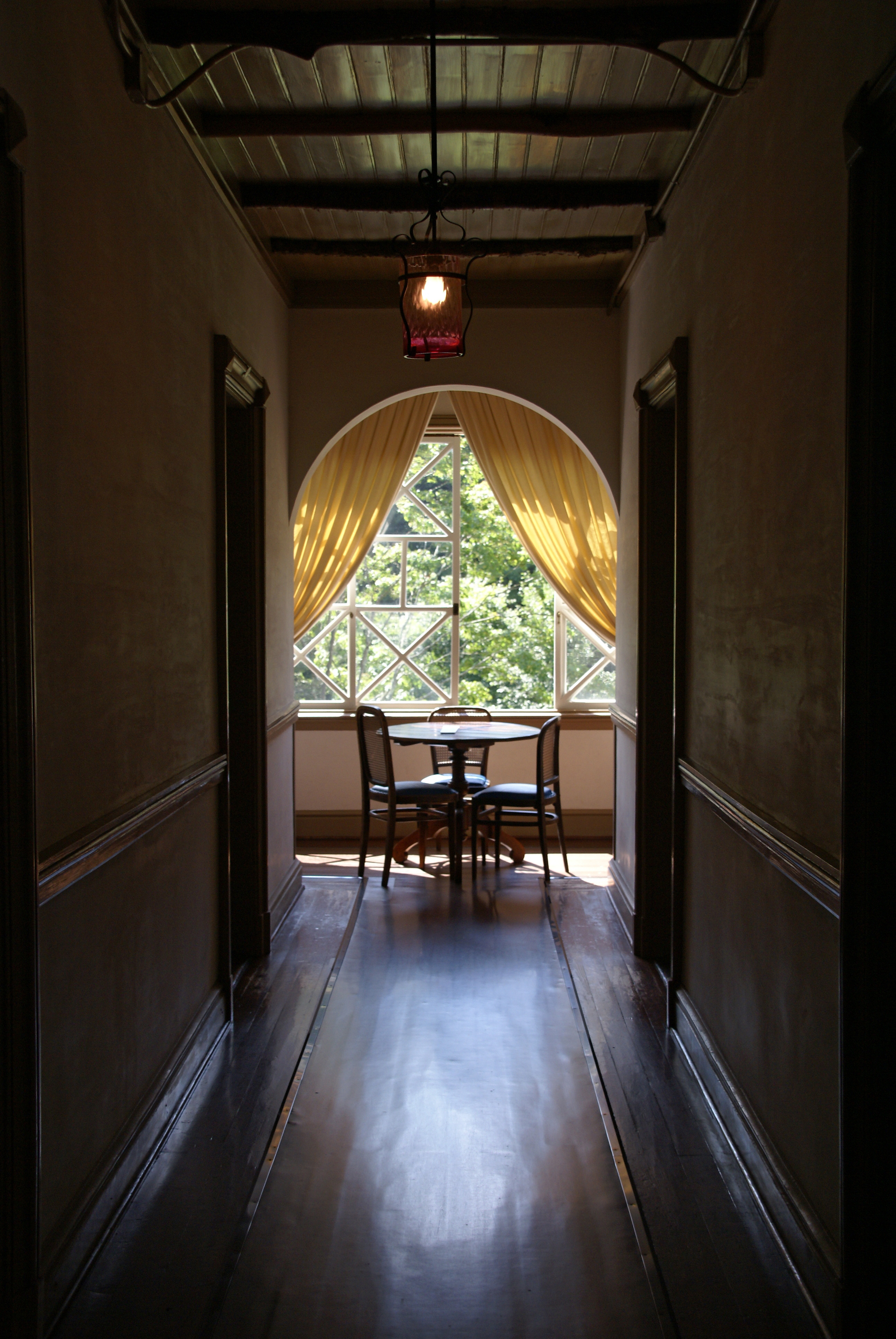 Old Mikasa Hotel in Karuizawa, Japan